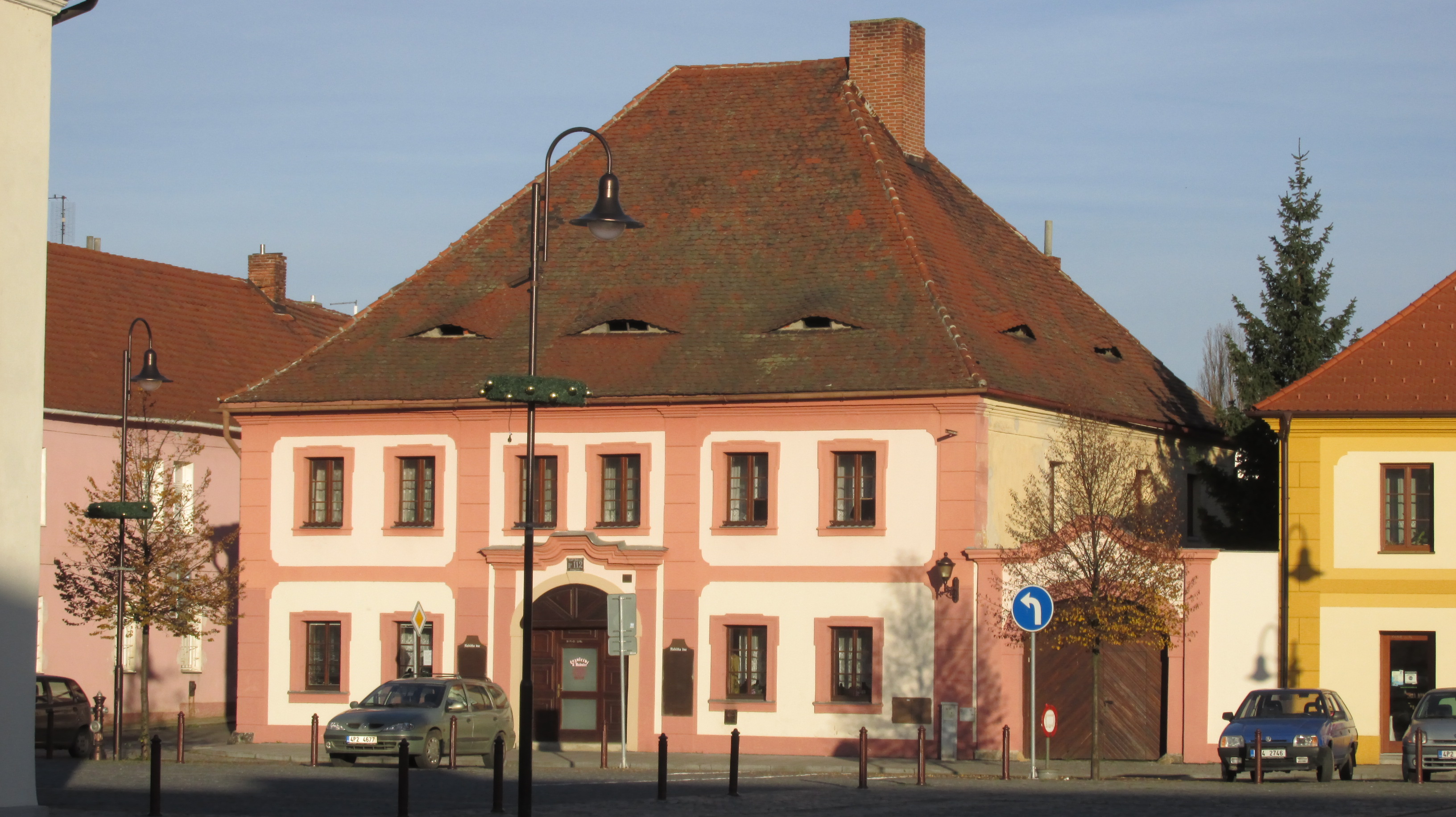 Dům náměstí T. G. Masaryka čp. 112, Dobřany.